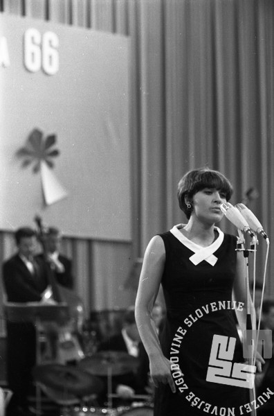 Festival Slovenska popevka v Tivoliju.